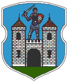 Herb osiedla tupu miejskiego Lubcz.